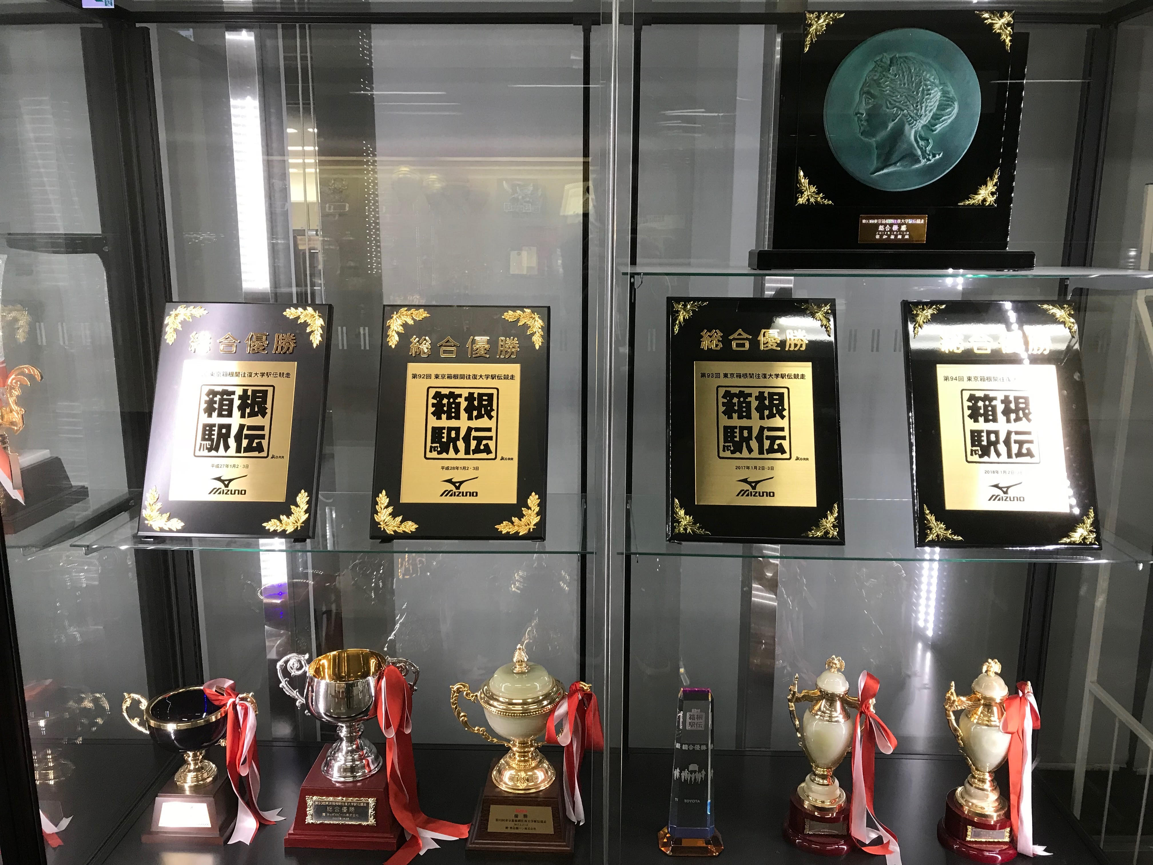 Salle des trophées de l'université Aoyama Gakuin avec les coupes remportées entre 2015 et 2018.